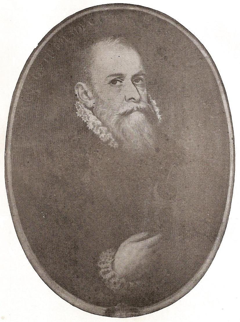 Retrato de Francisco Gutiérrez de Cuéllar, contador mayor de Felipe II. Situado en la capilla de Santiago de la Catedral de Segovia, la cual fundó.